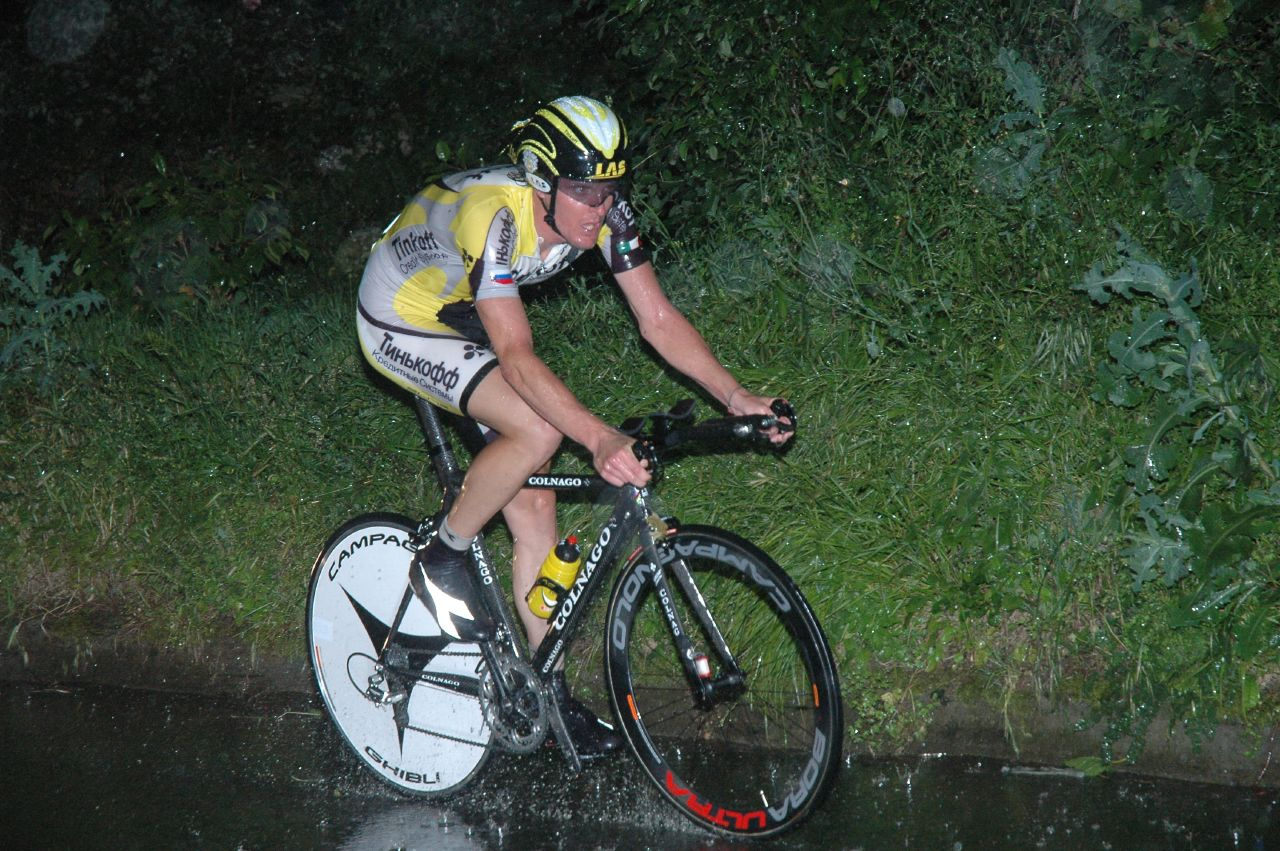 Jörg Jaksche, Euskal Bizikleta 2007